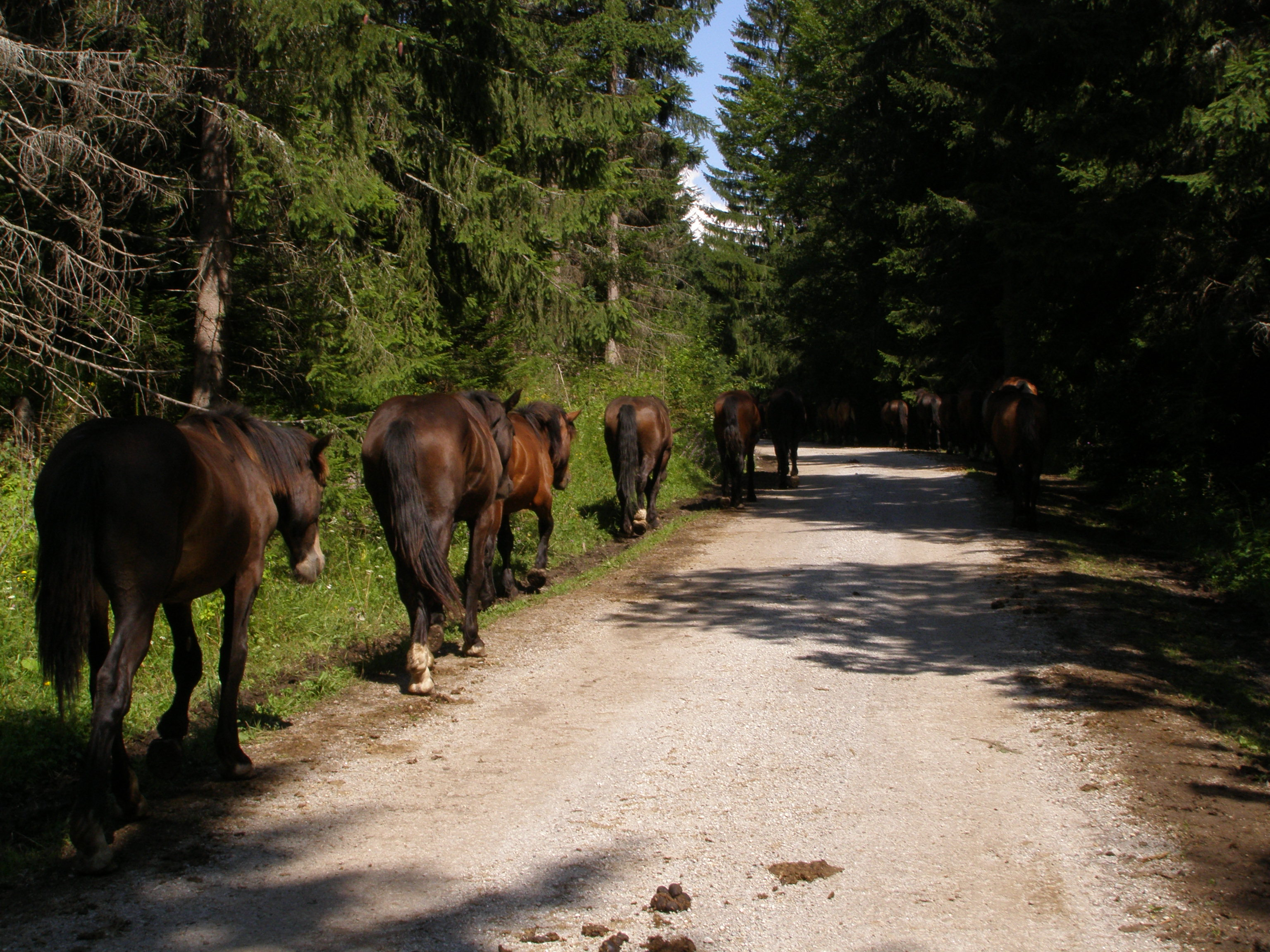 Slovenské rudohoří, Spišsko-gemerský kras, Muráňská planina, Maretkiná, Huculský kůň